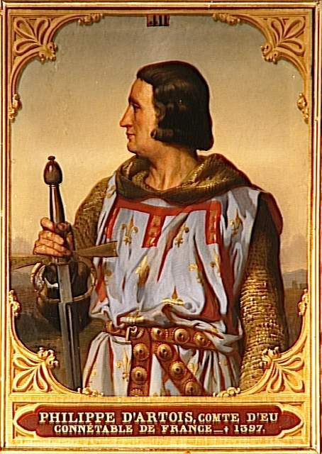 Commandé par Louis-Philippe pour le musée historique de Versailles en 1843.